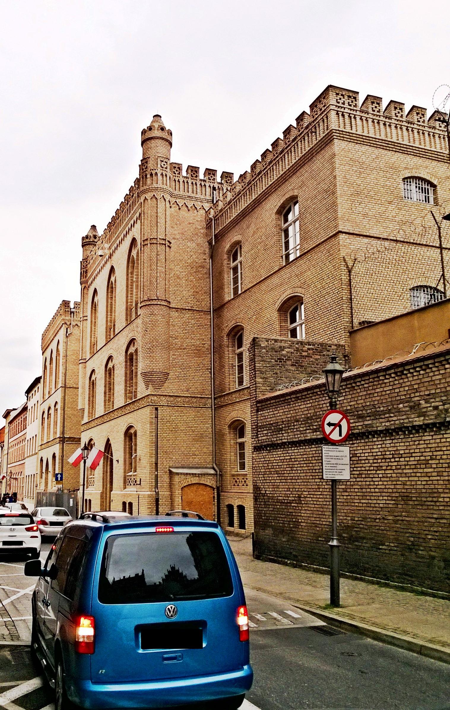 Budynek Sądu Okręgowego w Toruniu2019